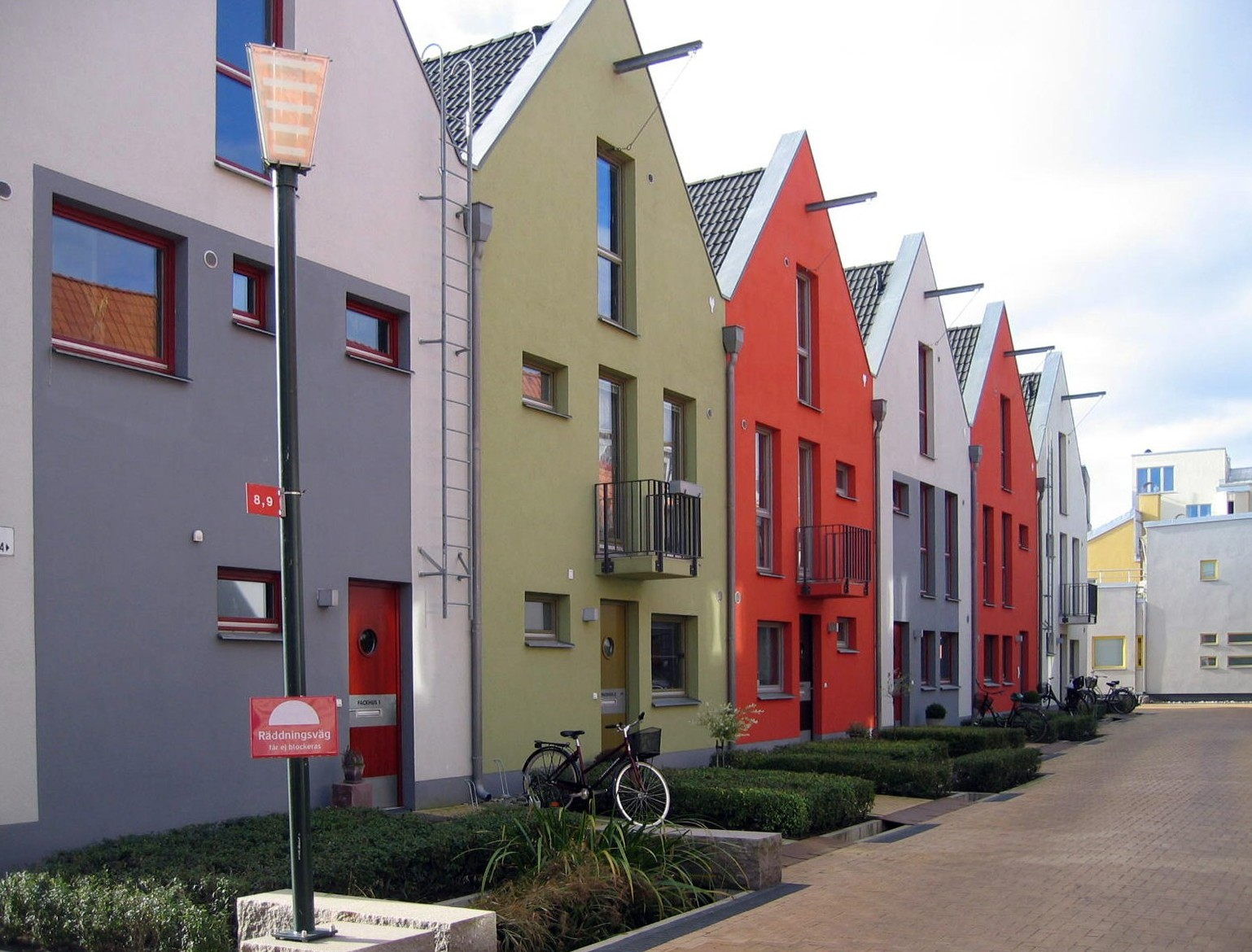 Photo by myself, Tomas Ottosson (Användare:Knuckles)